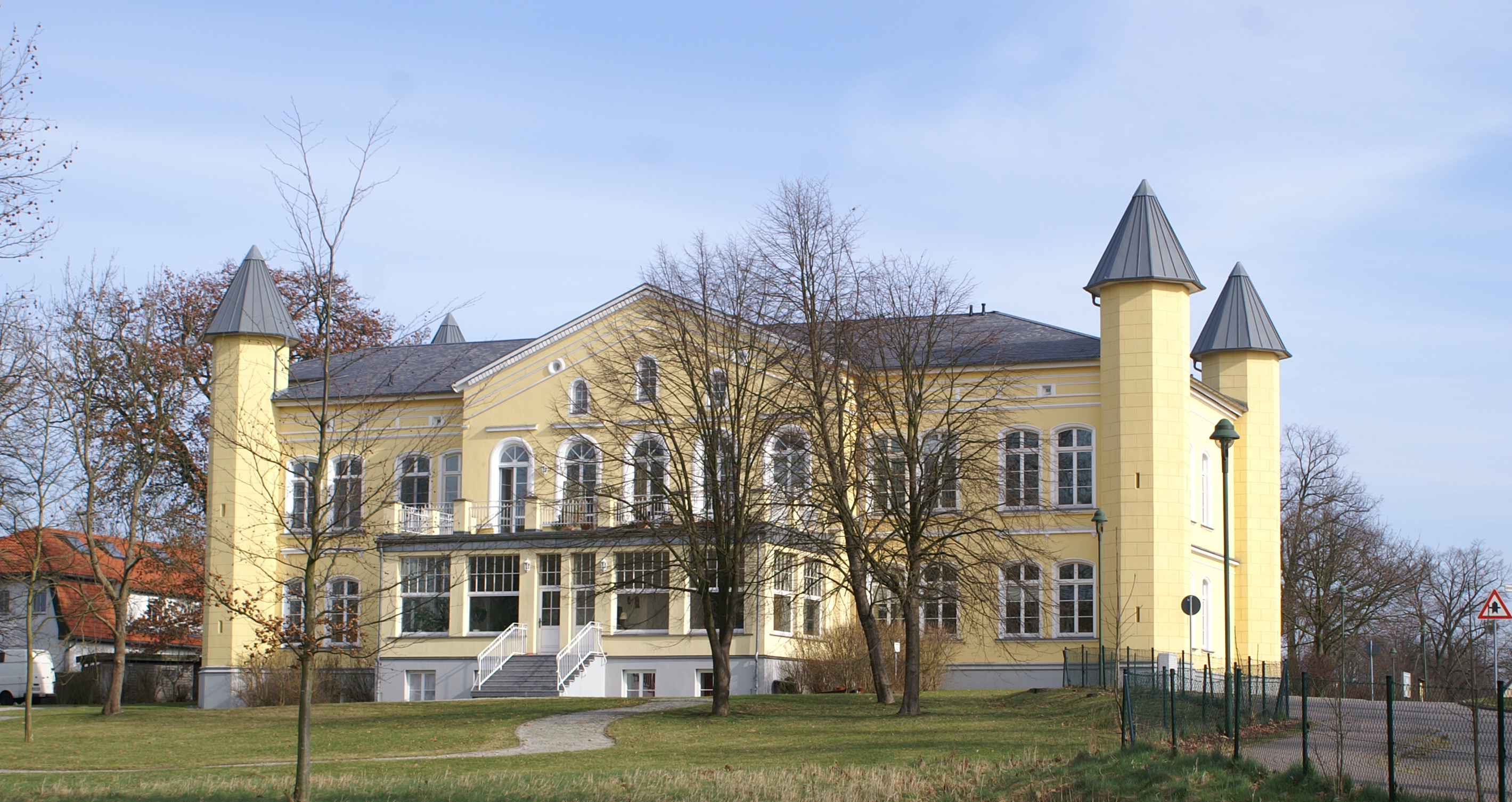 Gutshaus Leezen, Landkreis Parchim, Parkseite (West)